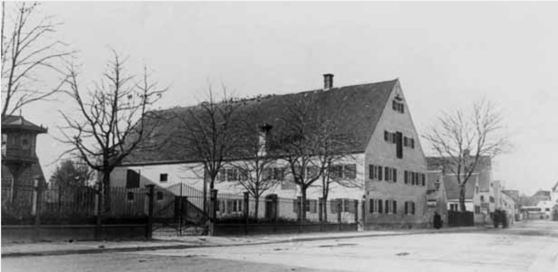 Der Strohmaier-Hof in der Winthirstraße 6, München-Neuhausen. Der Hof gehörte zuletzt der Familie Hauser. Georg Hauser erbte als Erstgeborener 1885 den Hof. Als er 1888 verstarb, fiel der Hof an seinen damals 19-Jahre alten Bruder Lorenz "Lenz" Hauser (1869-1918), der die großflächigen Ländereien gewinnbringend veräußerte und so zum reichsten Bauern Oberbayerns wurde. Als "Millionenbauer von München-Neuhausen" ging er in die Geschichte ein, erbaute unter anderem das Schloss Allach und war für seinen verschwenderischen Lebenswandel bekannt. Heute befindet sich auf dem Gelände eine Postfiliale.